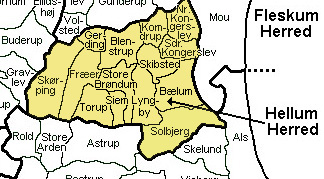 Hellum Herred, Aalborg Amt, Denmark